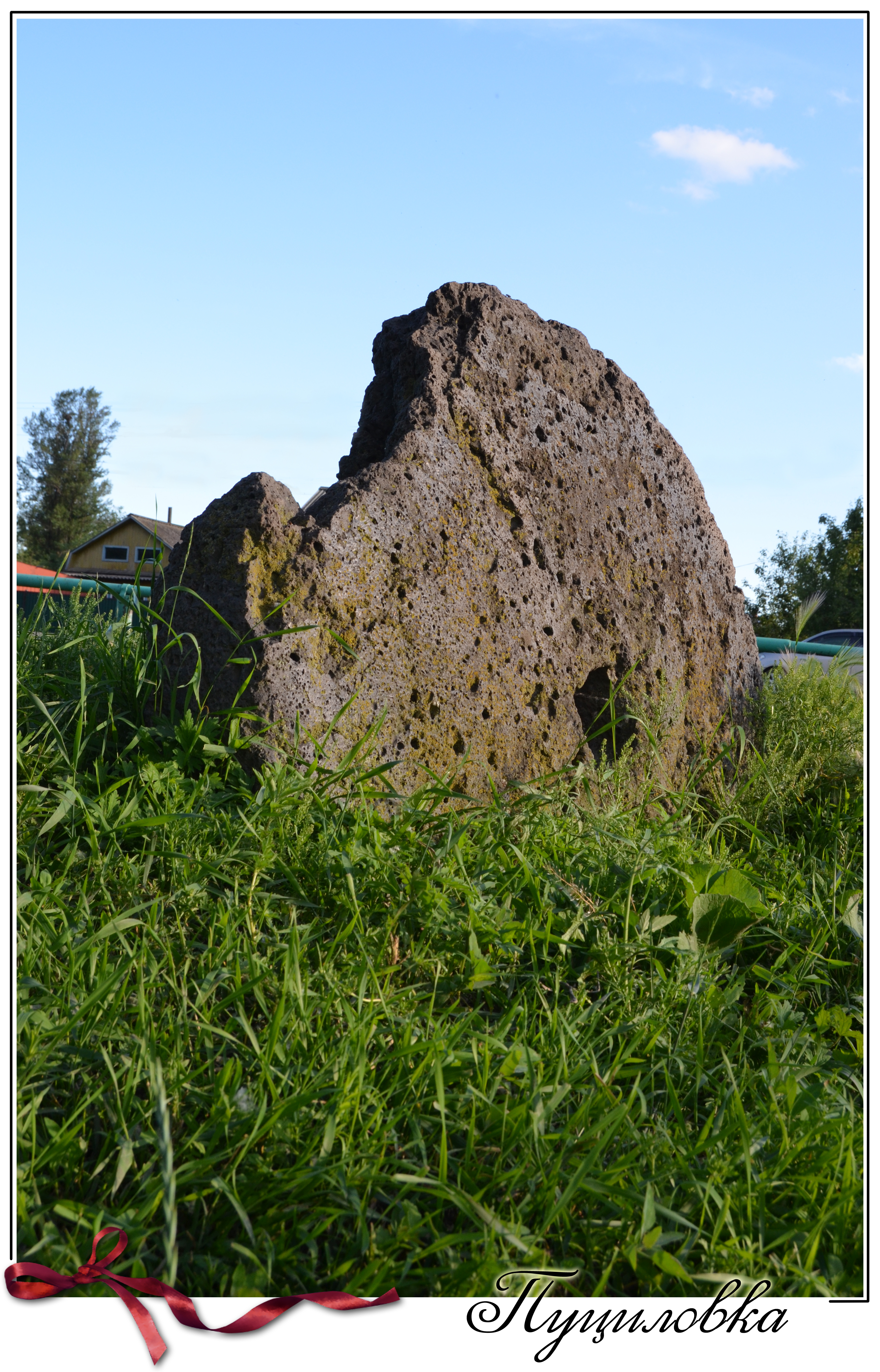 Корейский жёрнов.